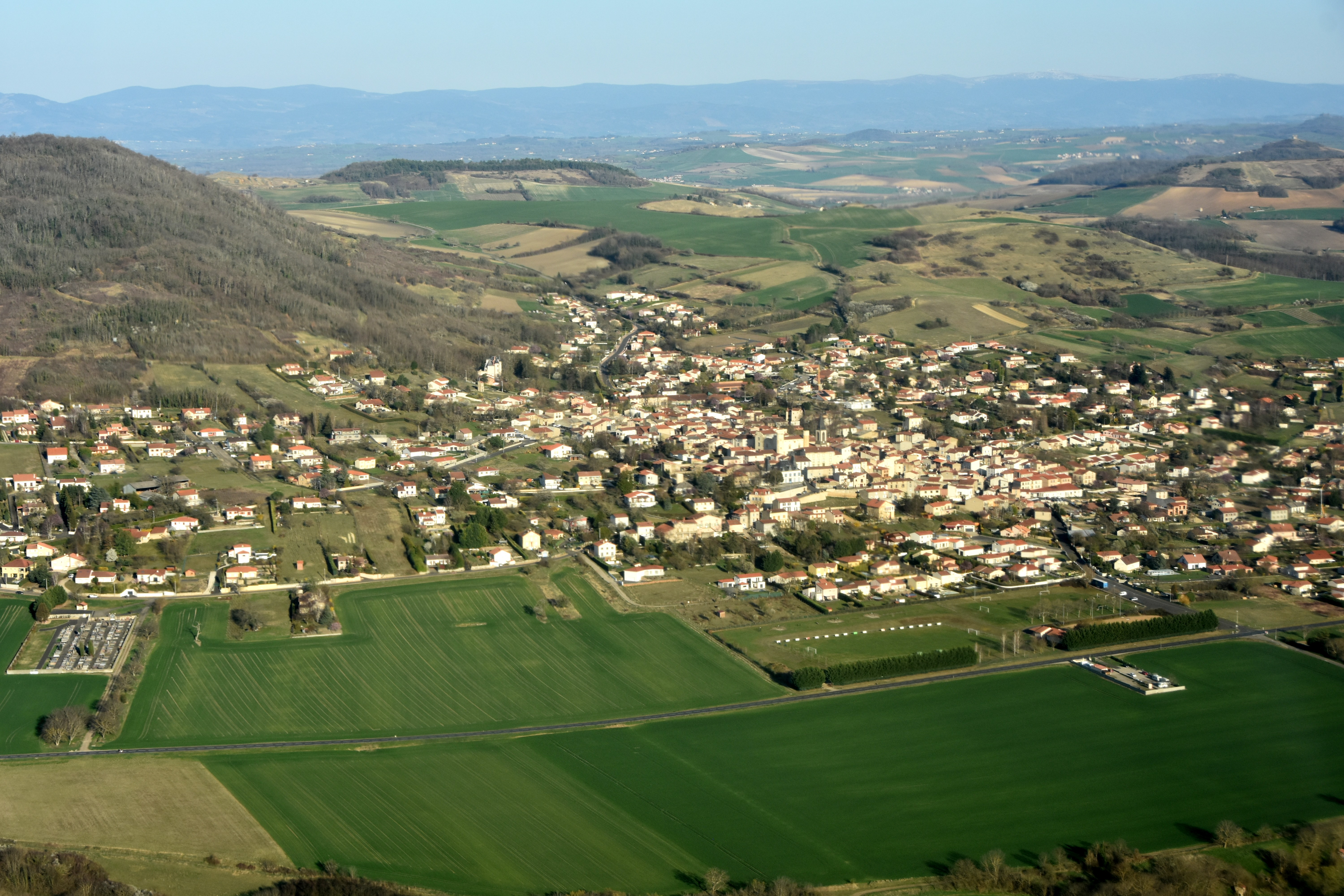 Vue sur la commune de Mezel le 22 mars 2019.